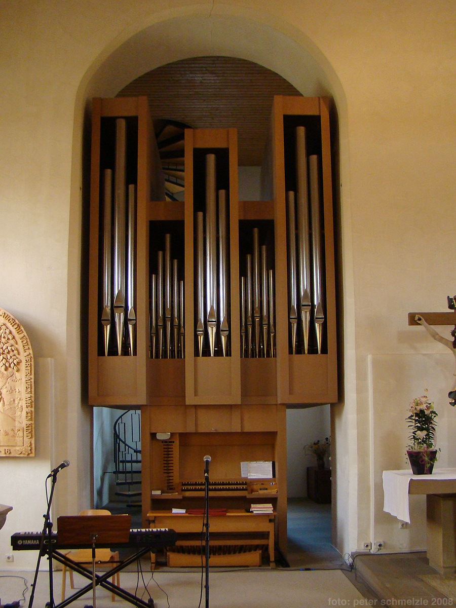 Orgel in Chorbogen der evang. Kirche in Stetten am Heuchelberg (Stadt Schwaigern)